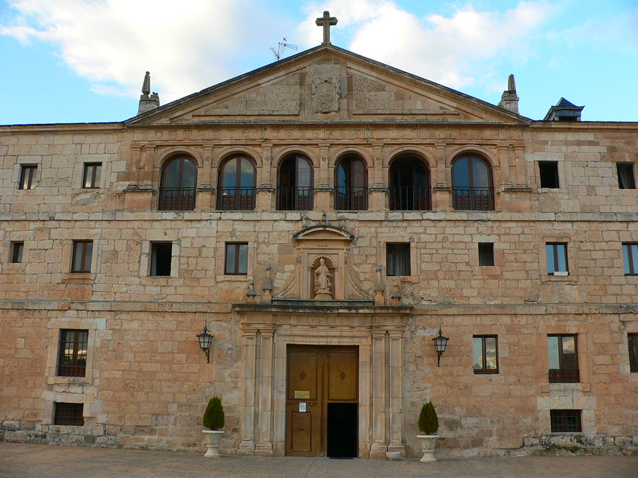 Monasterio de La Vid / La Vid Monastery, Burgos, Spain